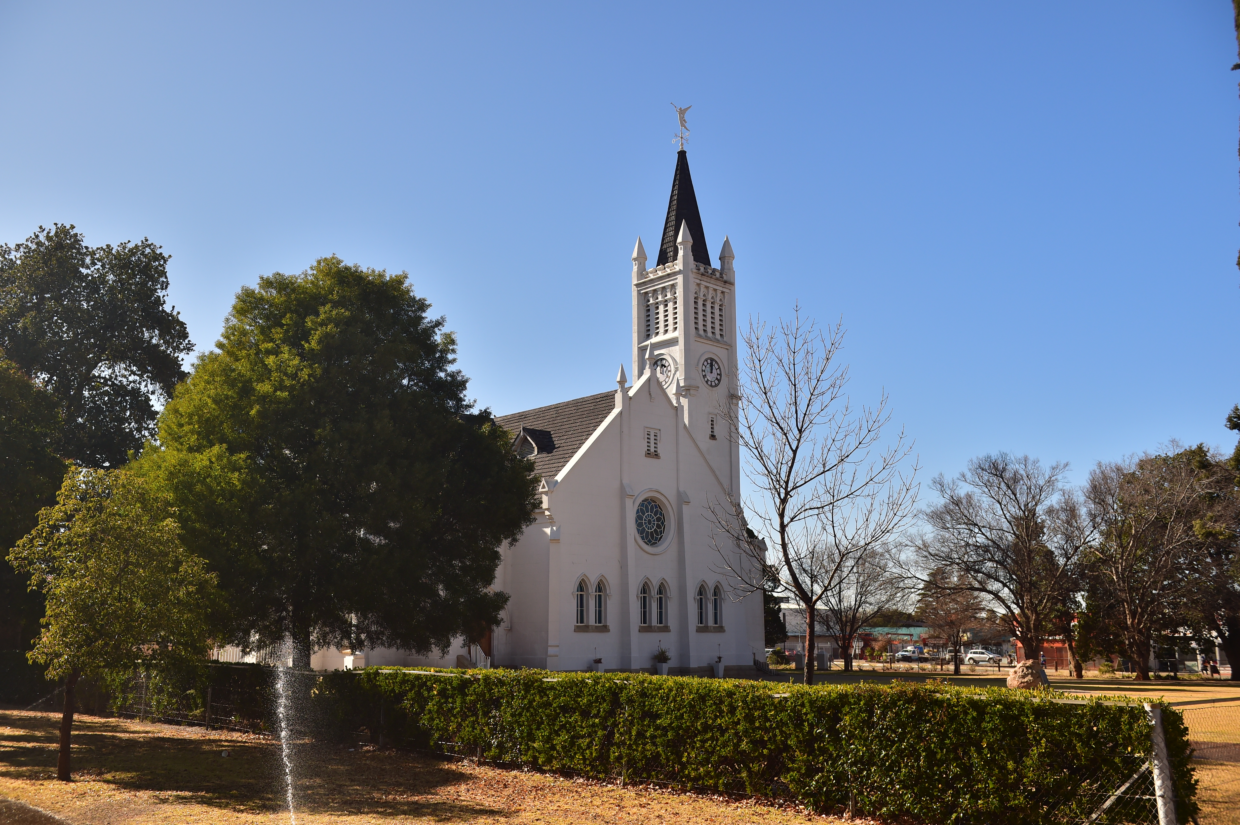 Vue du North West en Afrique du Sud.